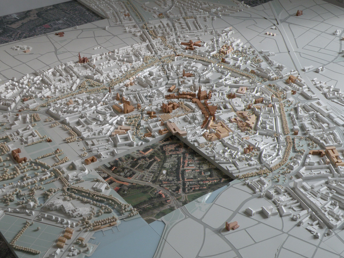 Stadtmodell: Blick auf das Gesamtmodell